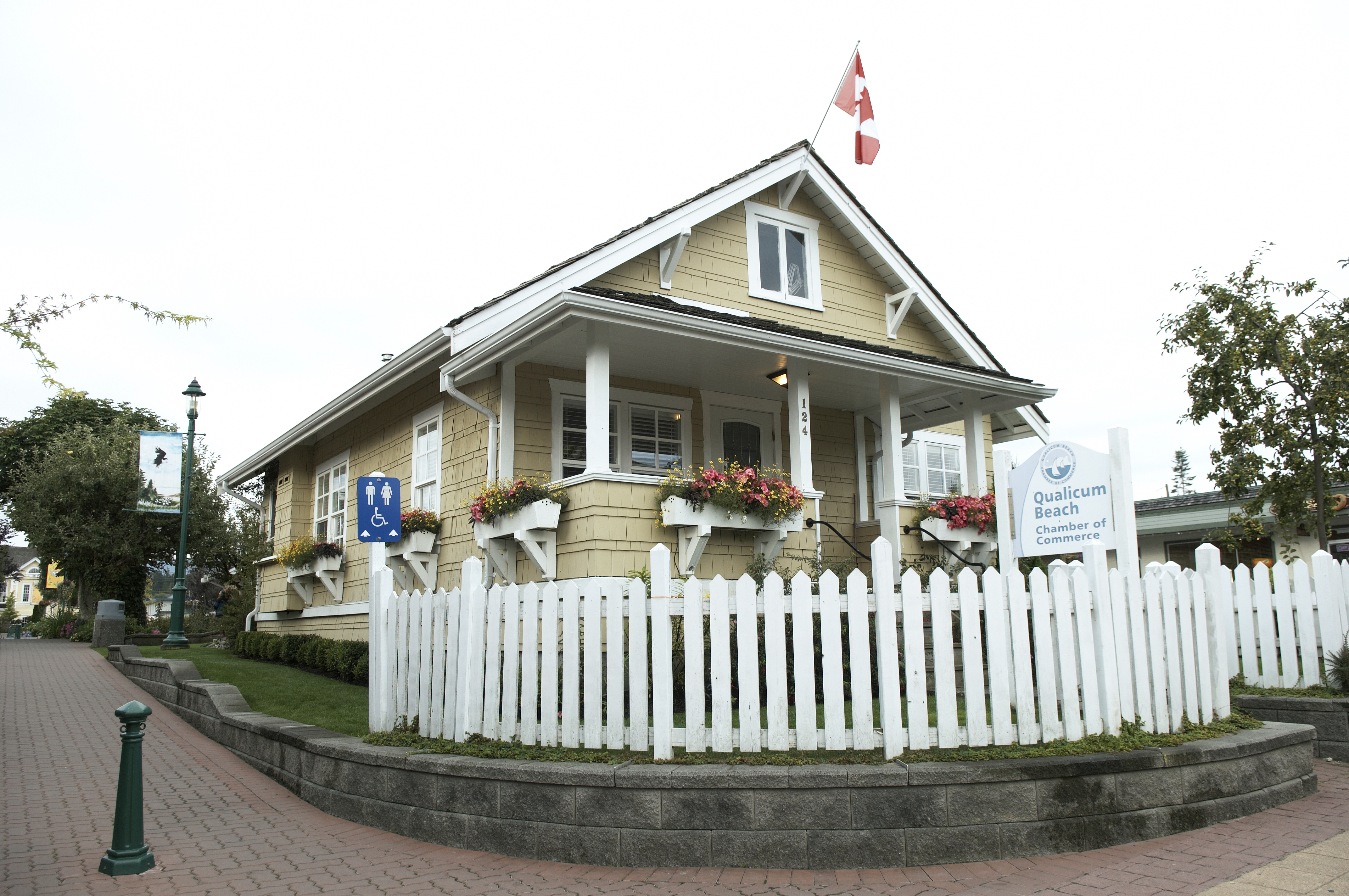 Pictures courtesy of Town of Qualicum Beach